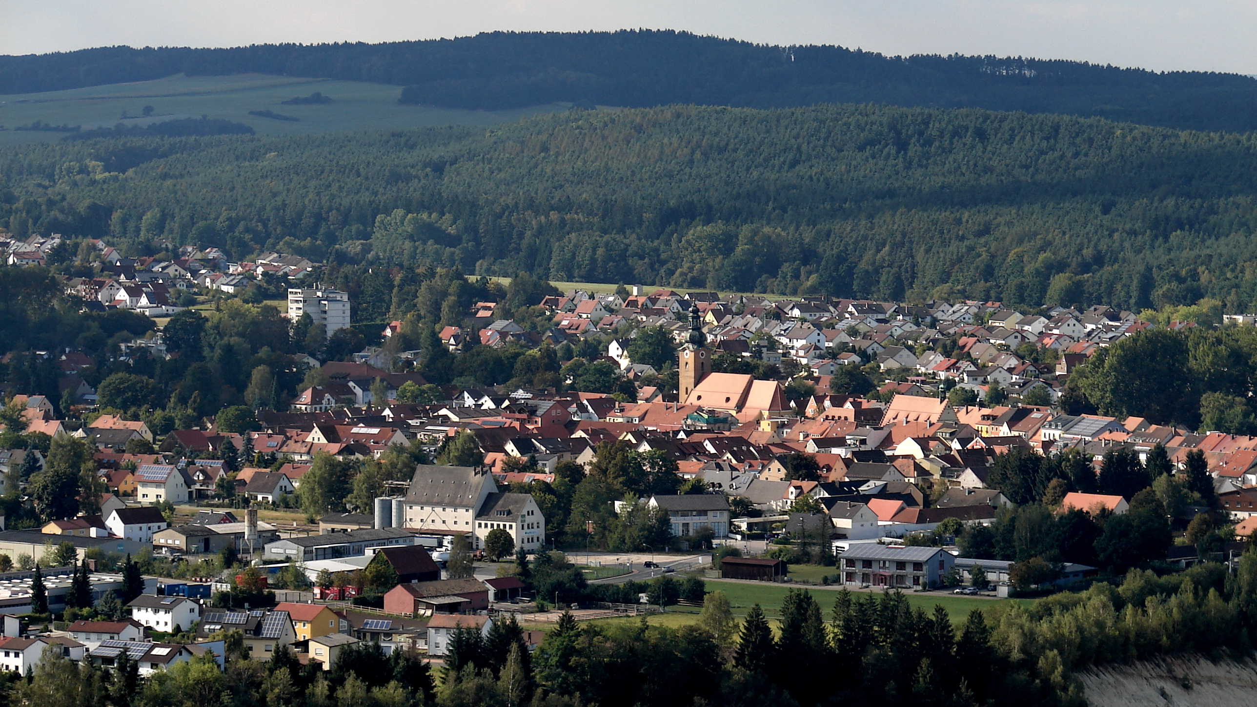 Hirschau ist eine Stadt im Landkreis Amberg-Sulzbach in Bayern.